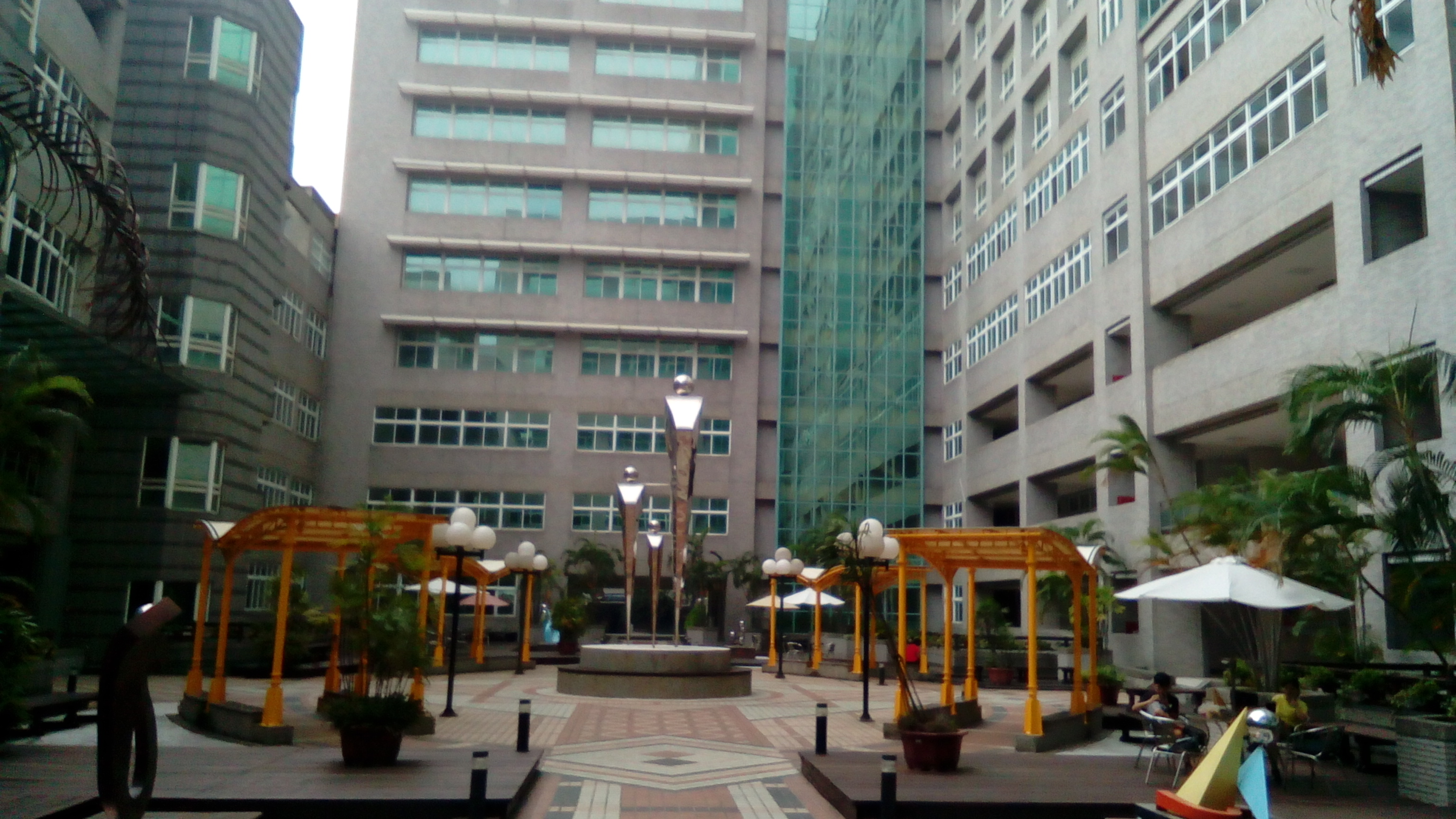 實為學生休息區 學生可在此品嘗咖啡及甜點